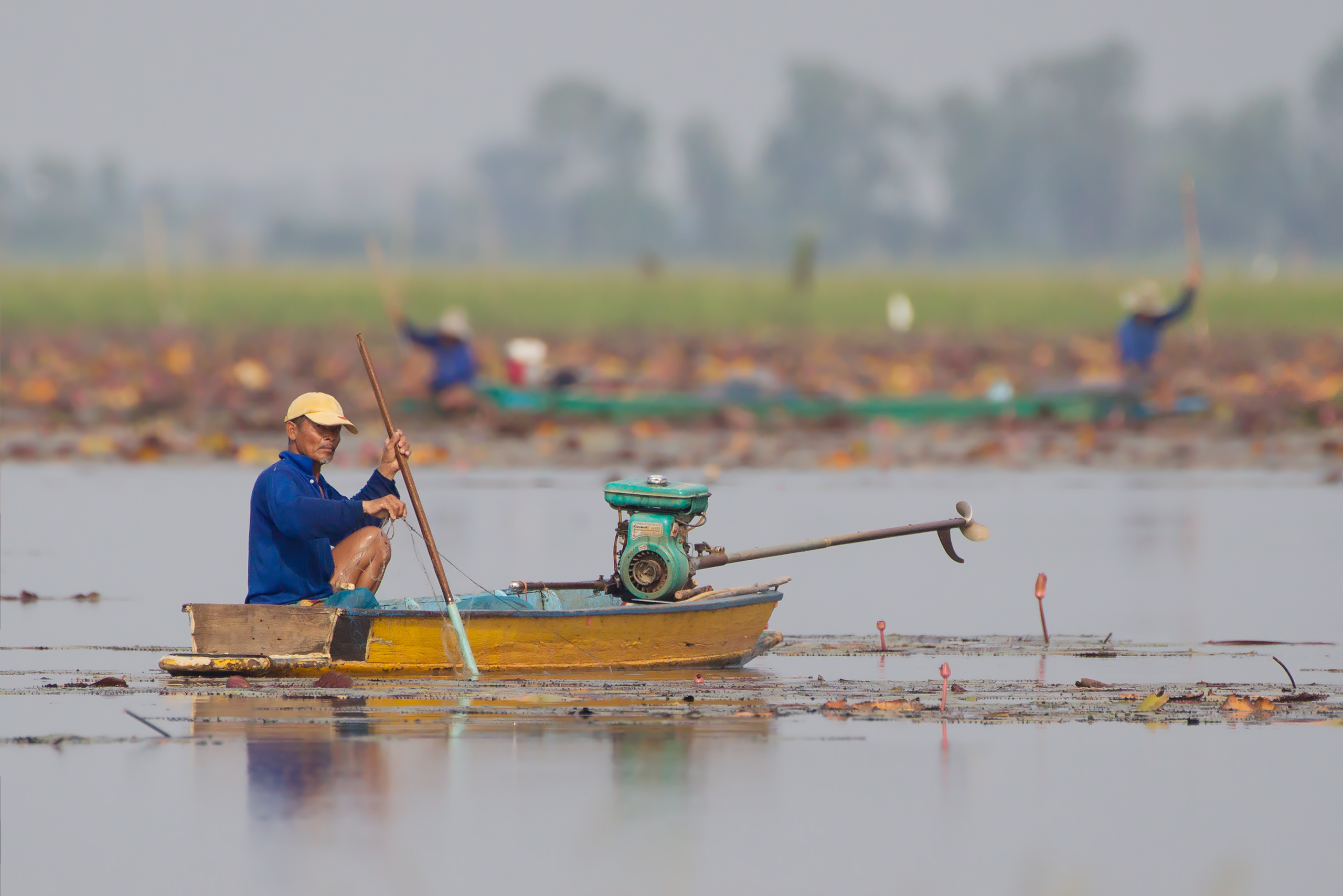 A man fishing, Bueng Boraphet, Nahkon Sawon, Thailand